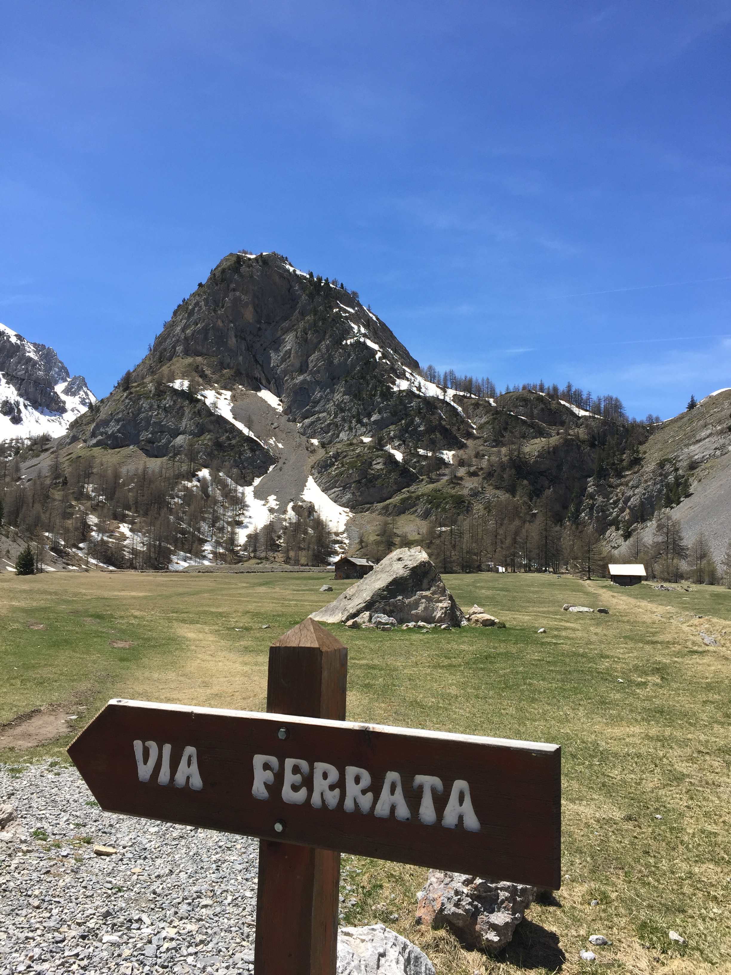 Ansicht des Pra Premier